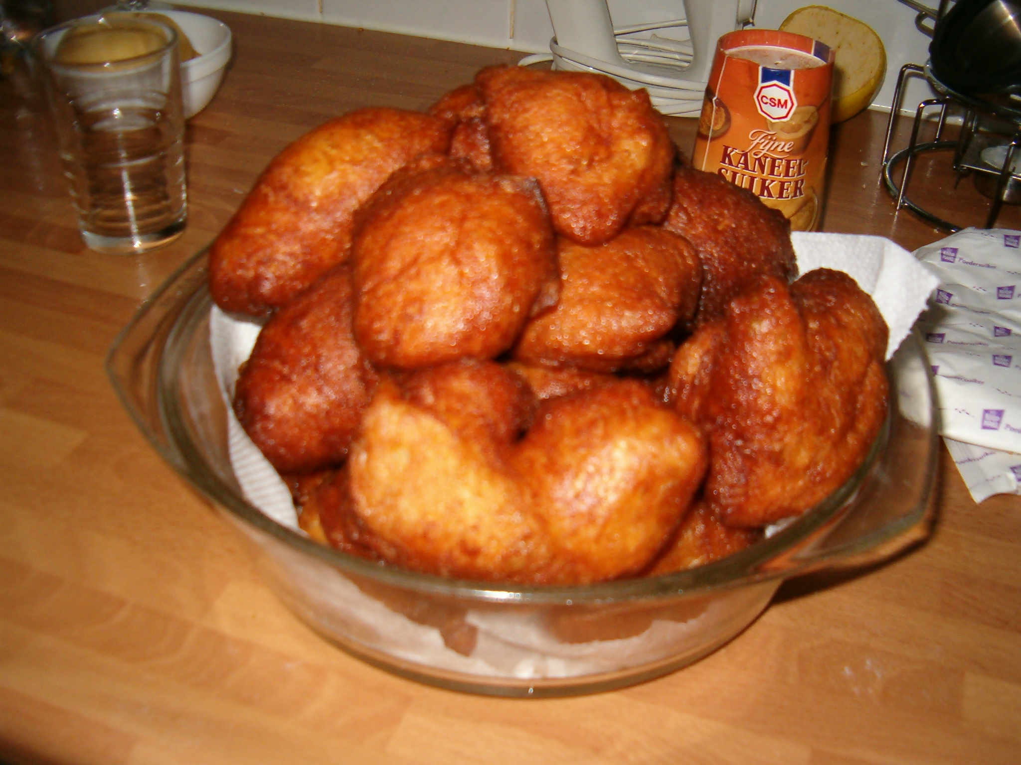 Oliebollen